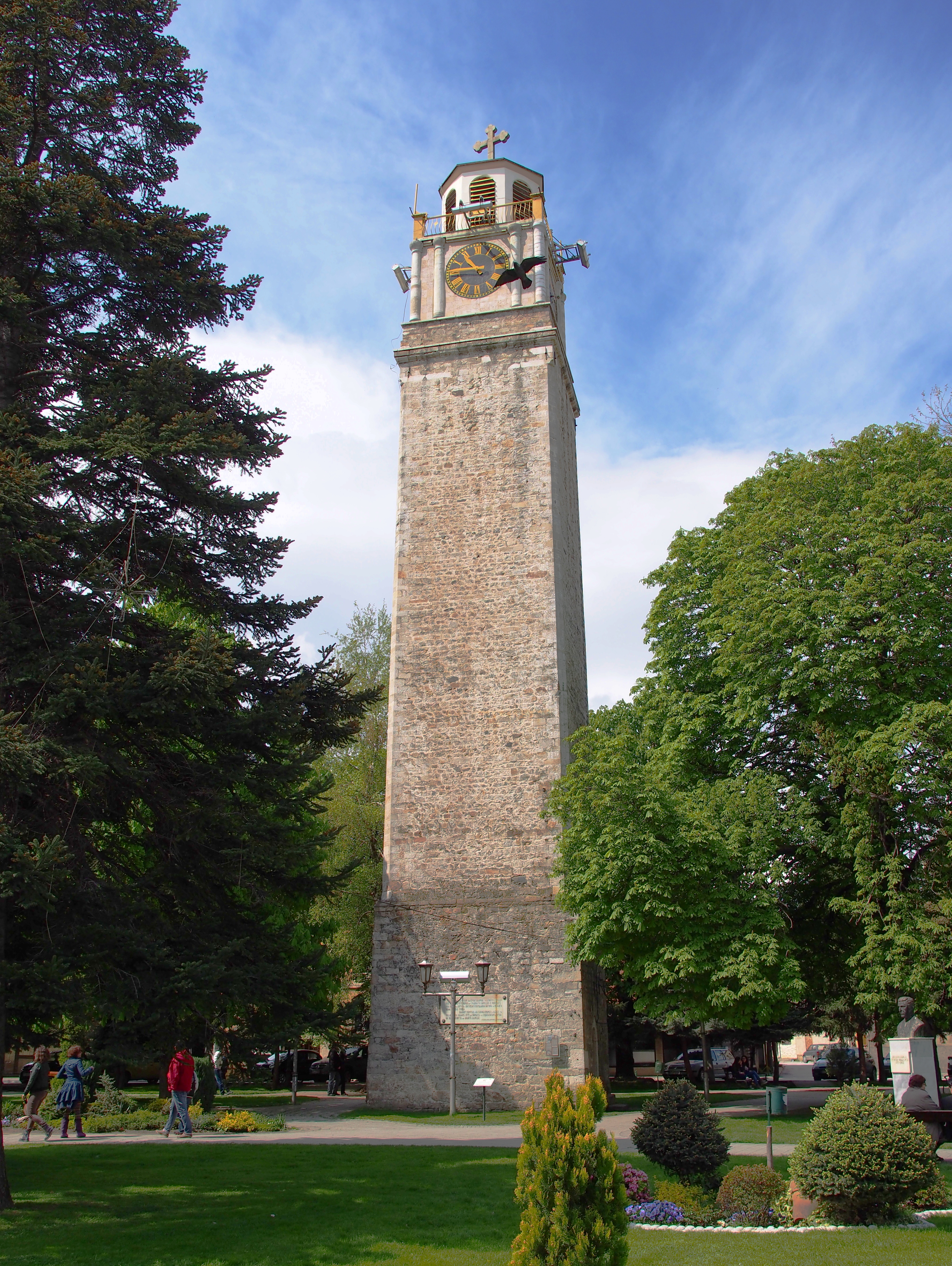 Српски (ћирилица): Сахат кула у Битољу. Македонија